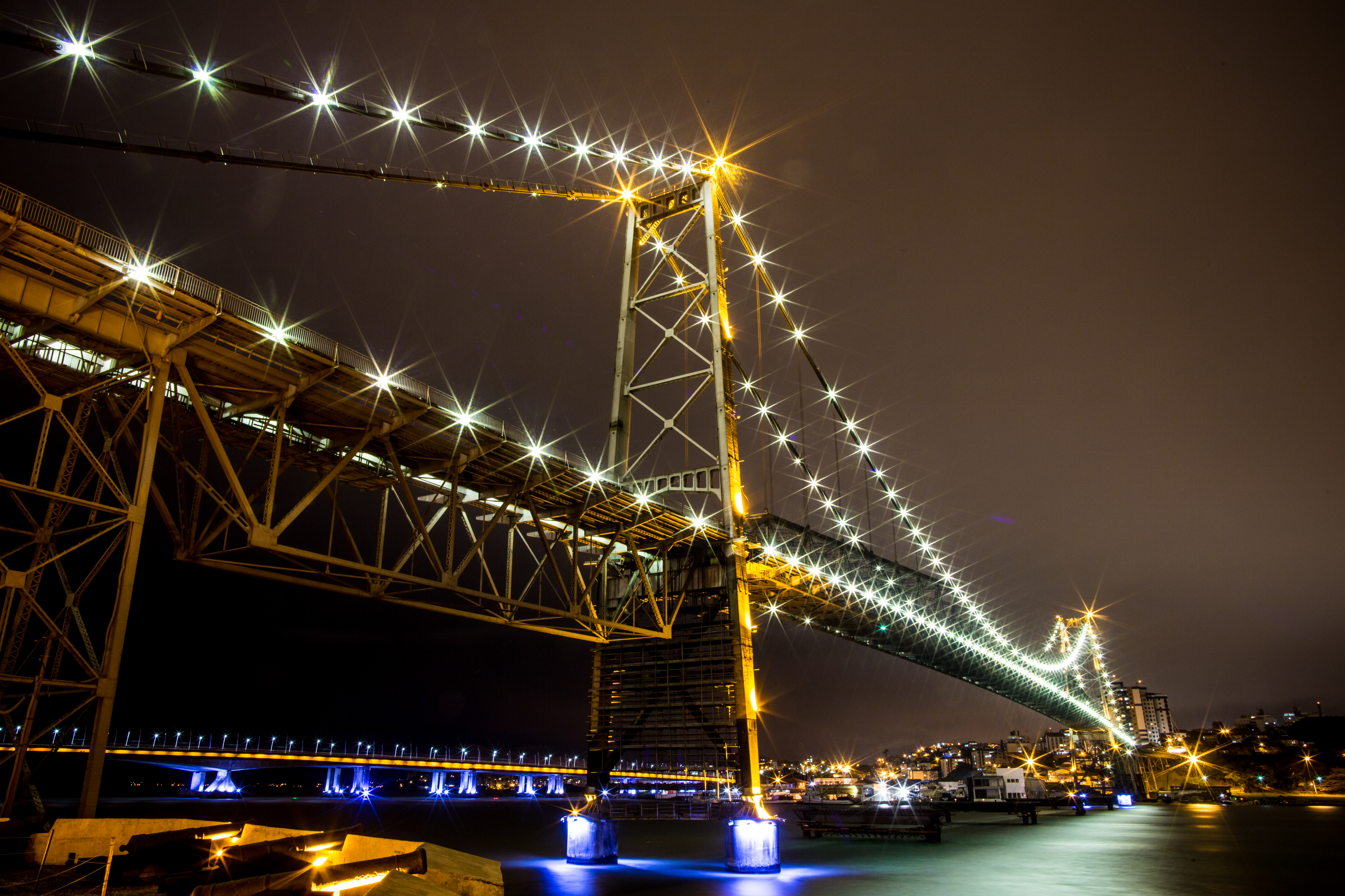 Fotografia da Ponte Hercílio Luz localizada em Florianópolis - Santa Catarina.